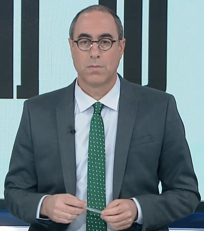 קלמן ליבסקינד, איש חדשות